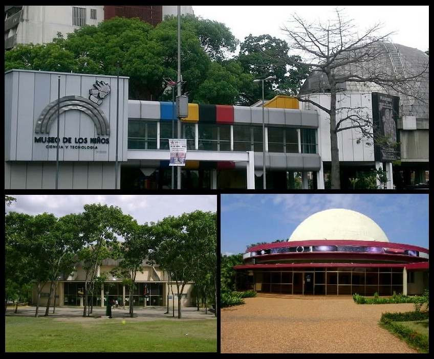 Planetarios de Venezuela arriba Palanetario del Museo de los Niños, abajo a la izquierda Planetario Humboldt y a la derecha Planaterio Simón Bolívar